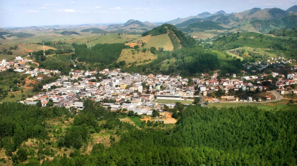 Iconha é um município brasileiro do estado do Espírito Santo. Está localizado na BR-101, região de montanha, onde os imigrantes italianos encontraram terras e clima perfeitos para o plantio do café e da banana. Segundo o IBGE, em 2013, a população de Iconha é estimada em 13.548 habitantes.